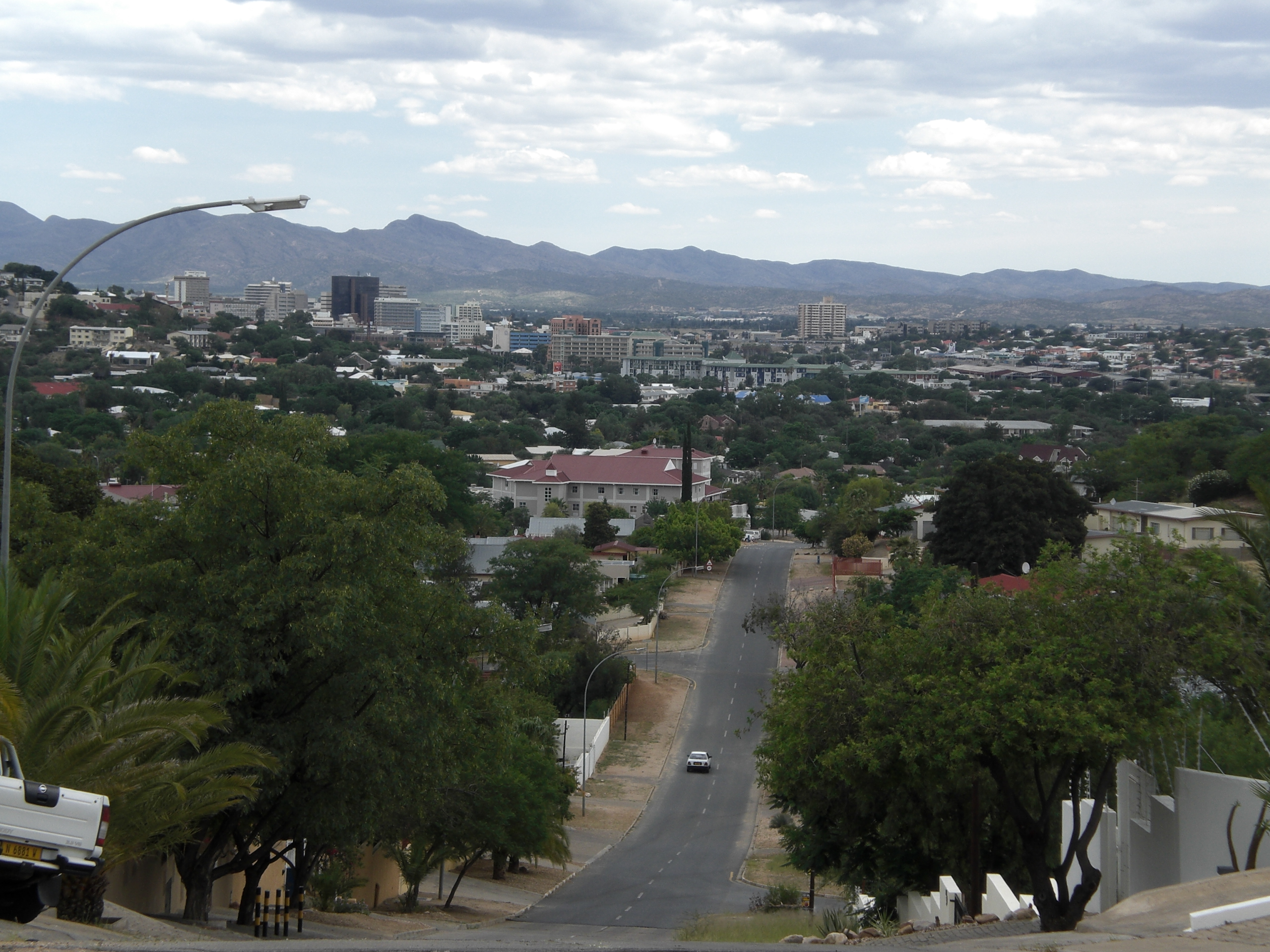 Blick von Eros Park auf Windhoek-Eros